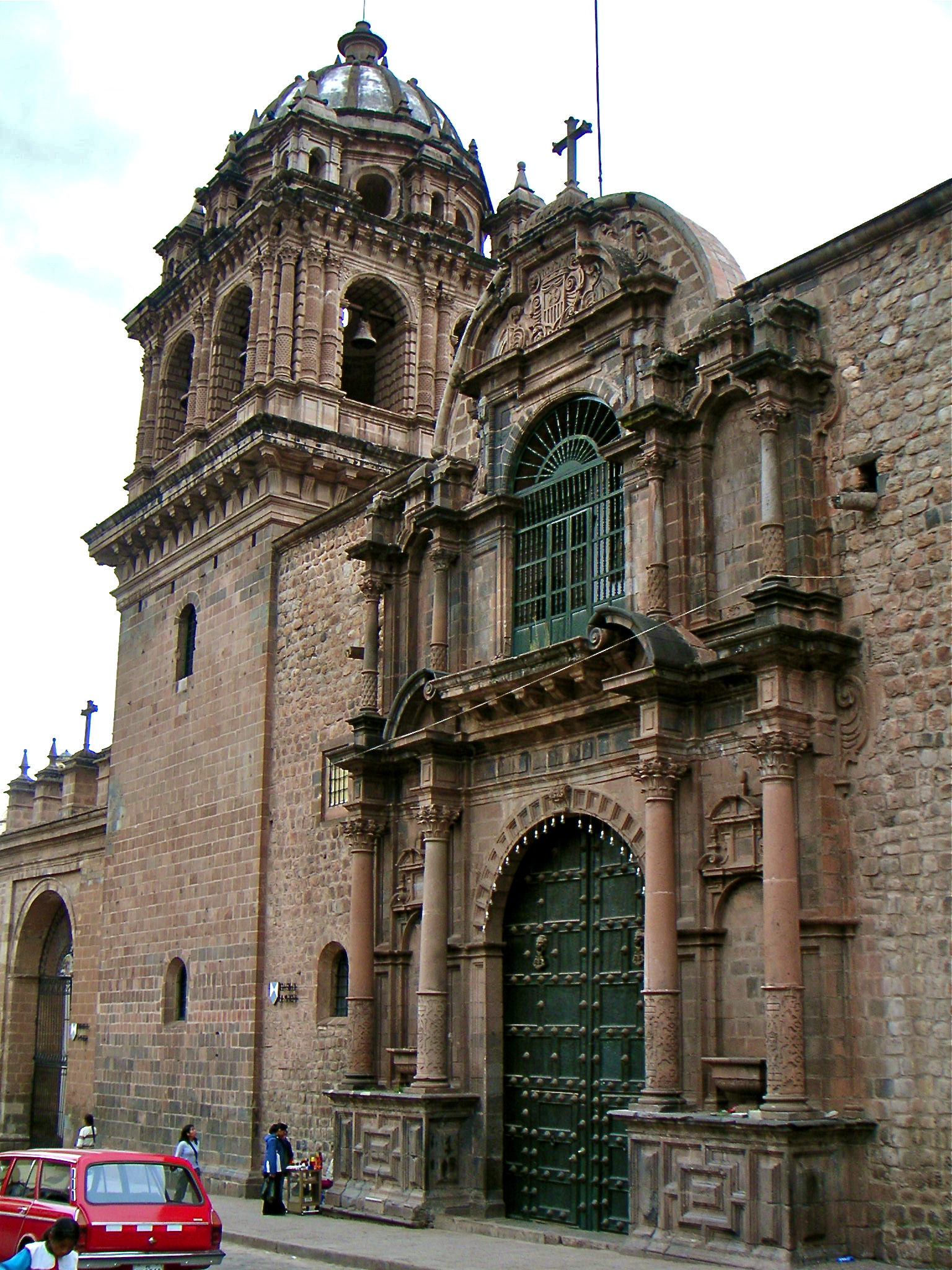 Cusco